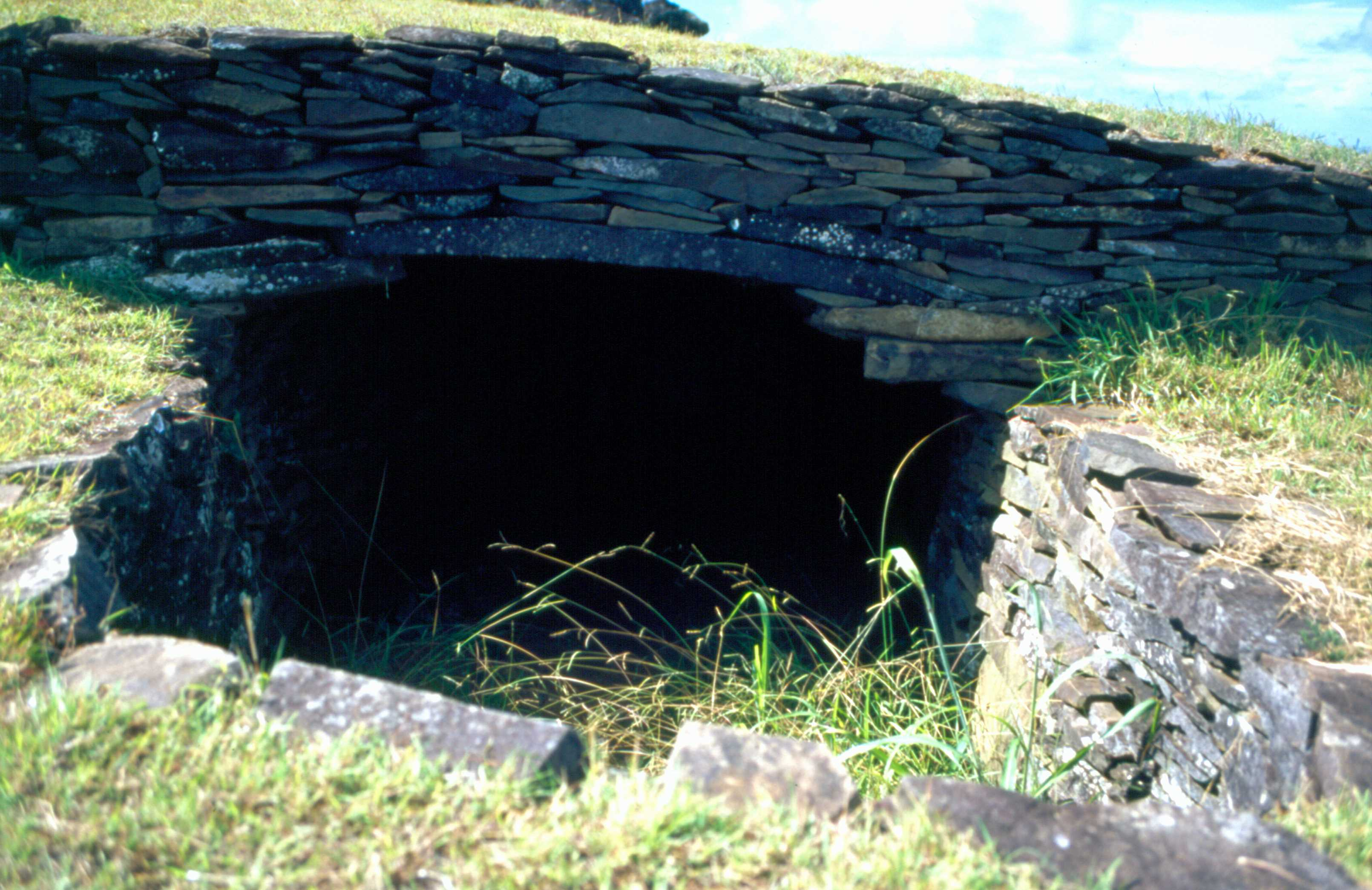 Steinhaus (Eingang) der Kultststätte Orongo auf der Osterinsel